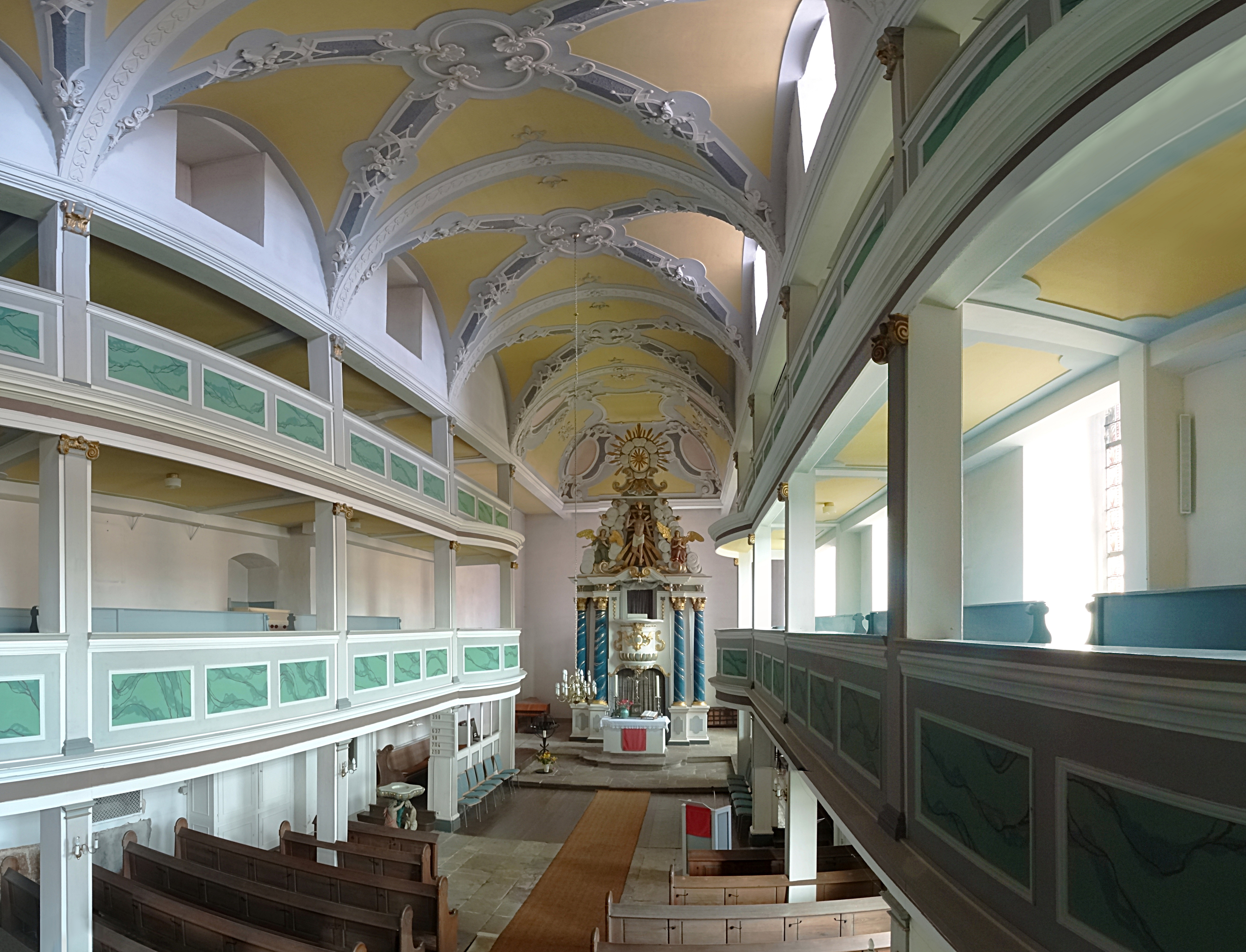 Innenraum Panorama Stadtkirche St. Marien zu Bad Berka